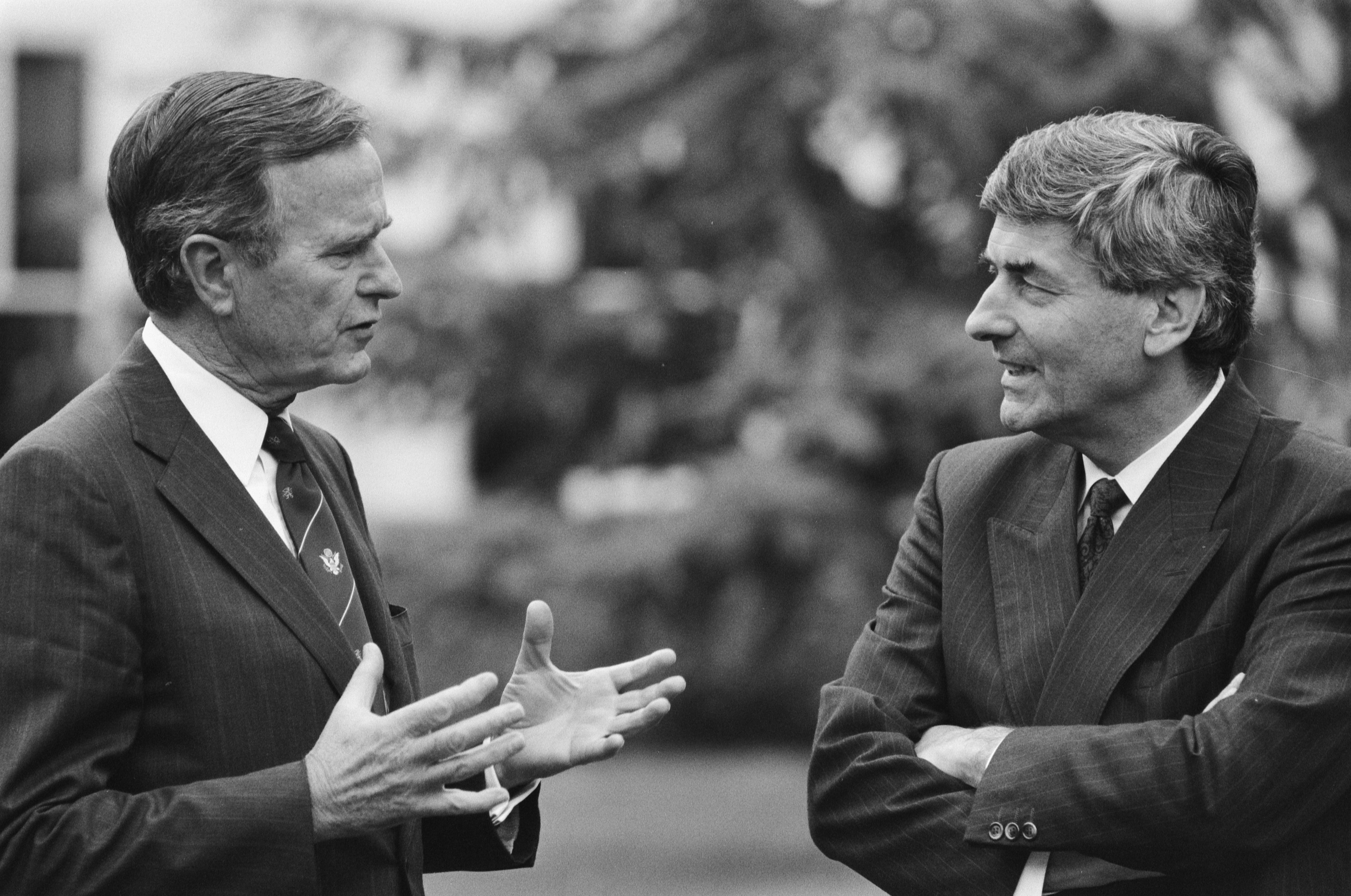 Collectie / Archief : Fotocollectie Anefo Reportage / Serie : Bezoek van President Bush van de Verenigde Staten aan Nederland Beschrijving : Premier Lubbers en President Bush in de tuin van het Catshuis Datum : 17 juli 1989 Locatie : Den Haag, Zuid-Holland Trefwoorden : bezoeken, premiers, presidenten, tuinen Persoonsnaam : Bush, George H.W., Lubbers, Ruud Fotograaf : Croes, Rob C. / Anefo Auteursrechthebbende : Nationaal Archief Materiaalsoort : Negatief (zwart/wit) Nummer archiefinventaris : bekijk toegang 2.24.01.05 Bestanddeelnummer : 934-4836